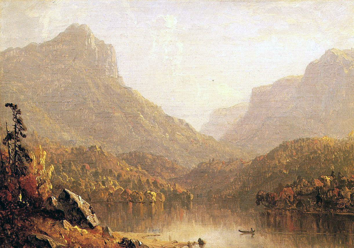 Lake Scene 1861